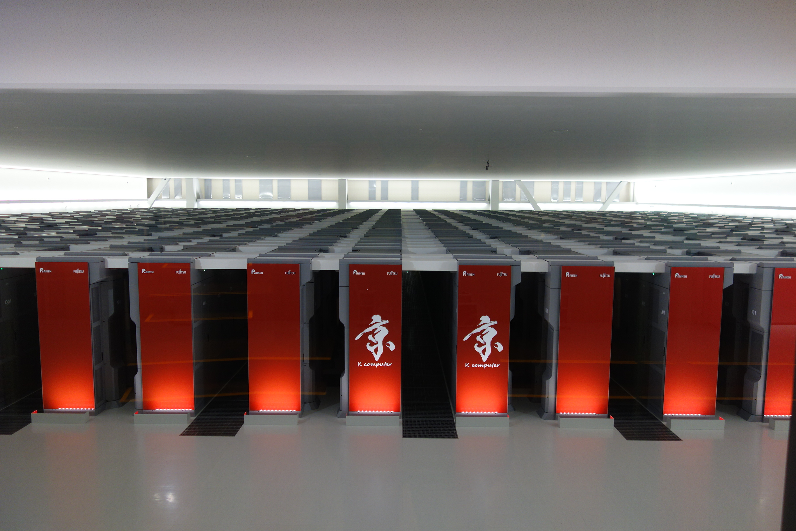 京コンピュータ